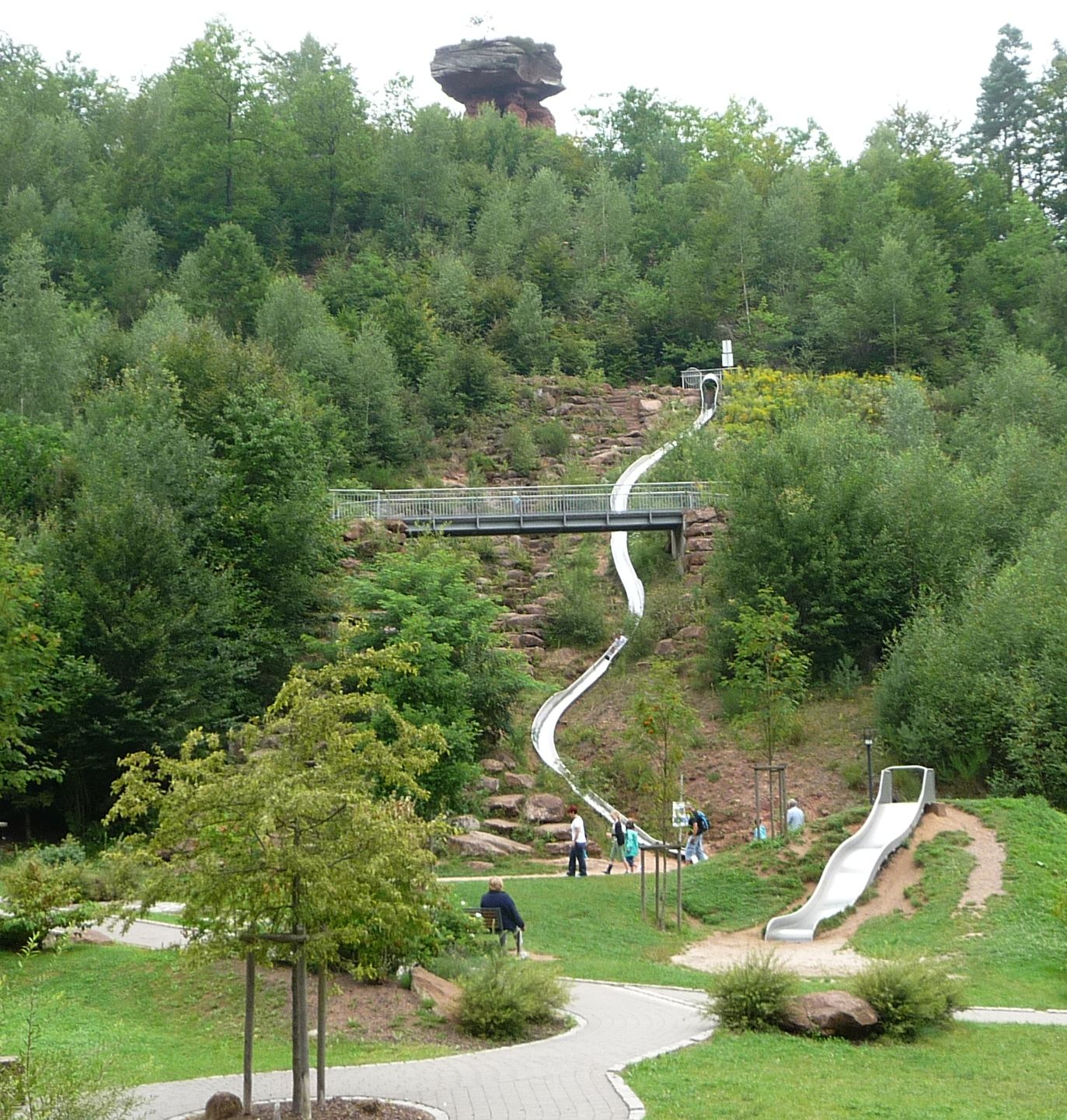 Der Erlebnispark Teufelstisch betont die Sichtachse zum Teufelstisch.